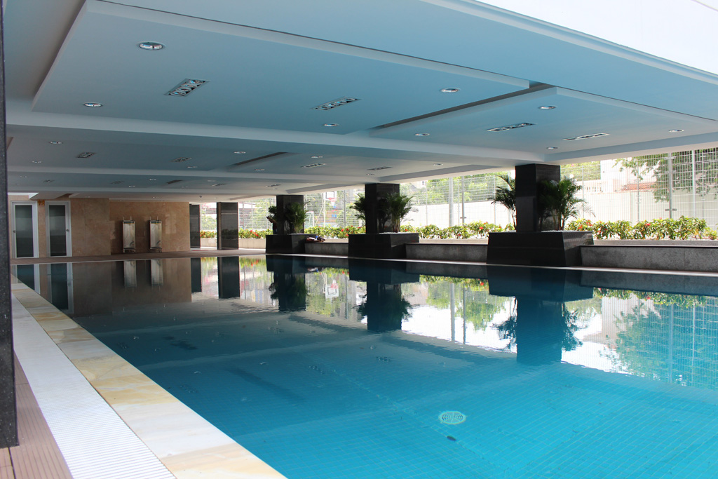 Charles Hickcox Pool